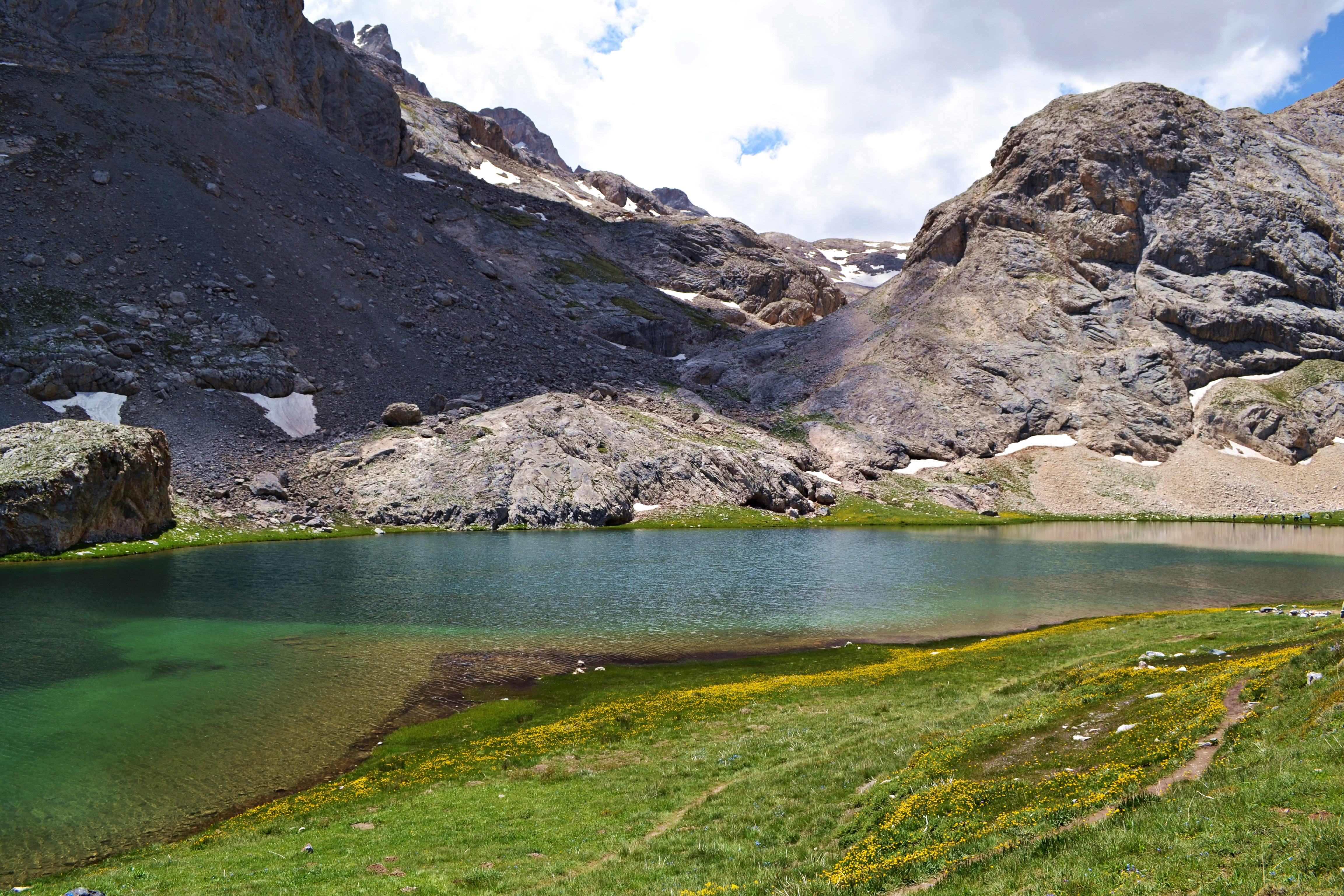 Karagöl